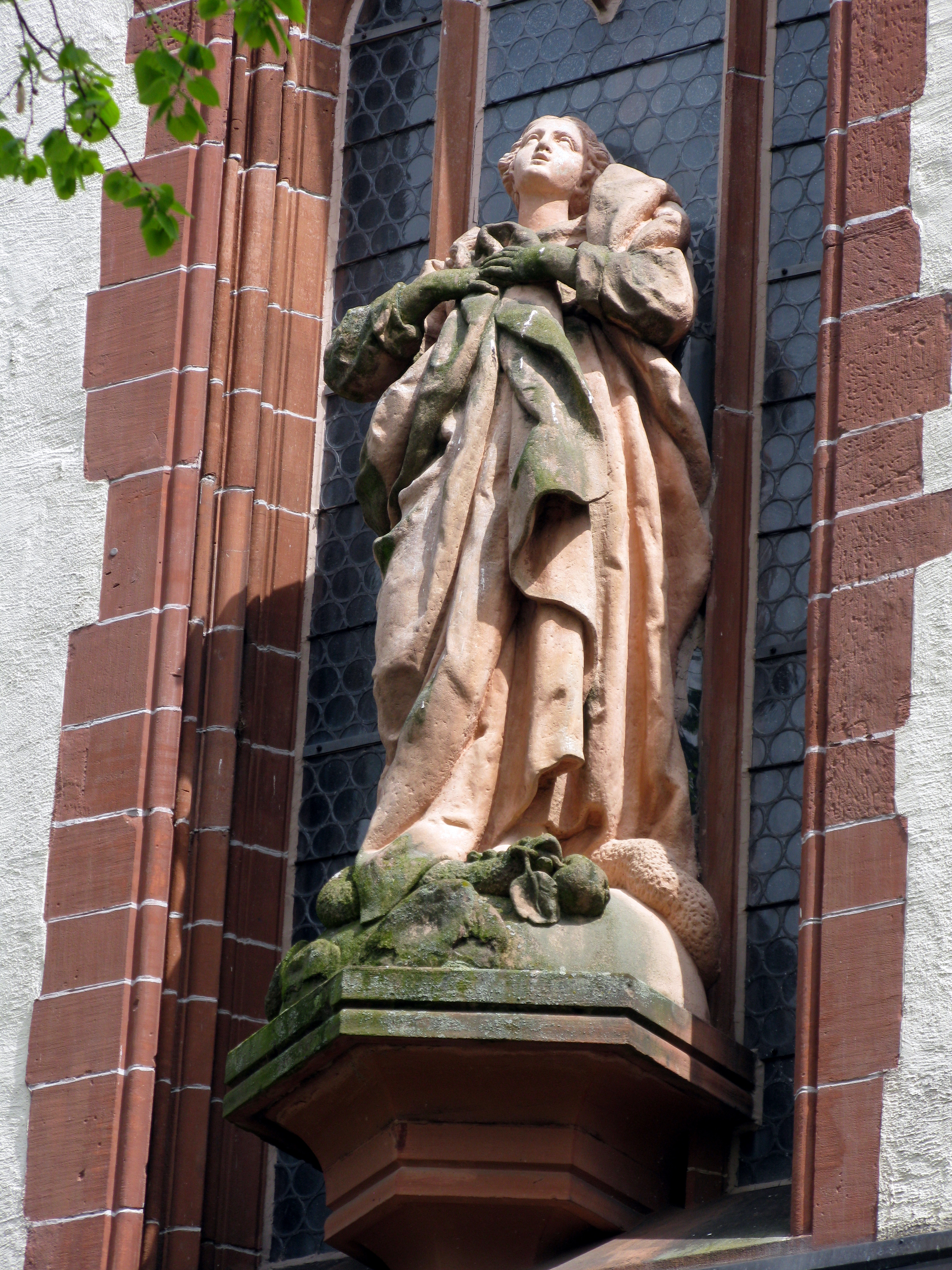 St. Laurentius in Kenzingen, Immaculata von Johann Christian Wentzinger